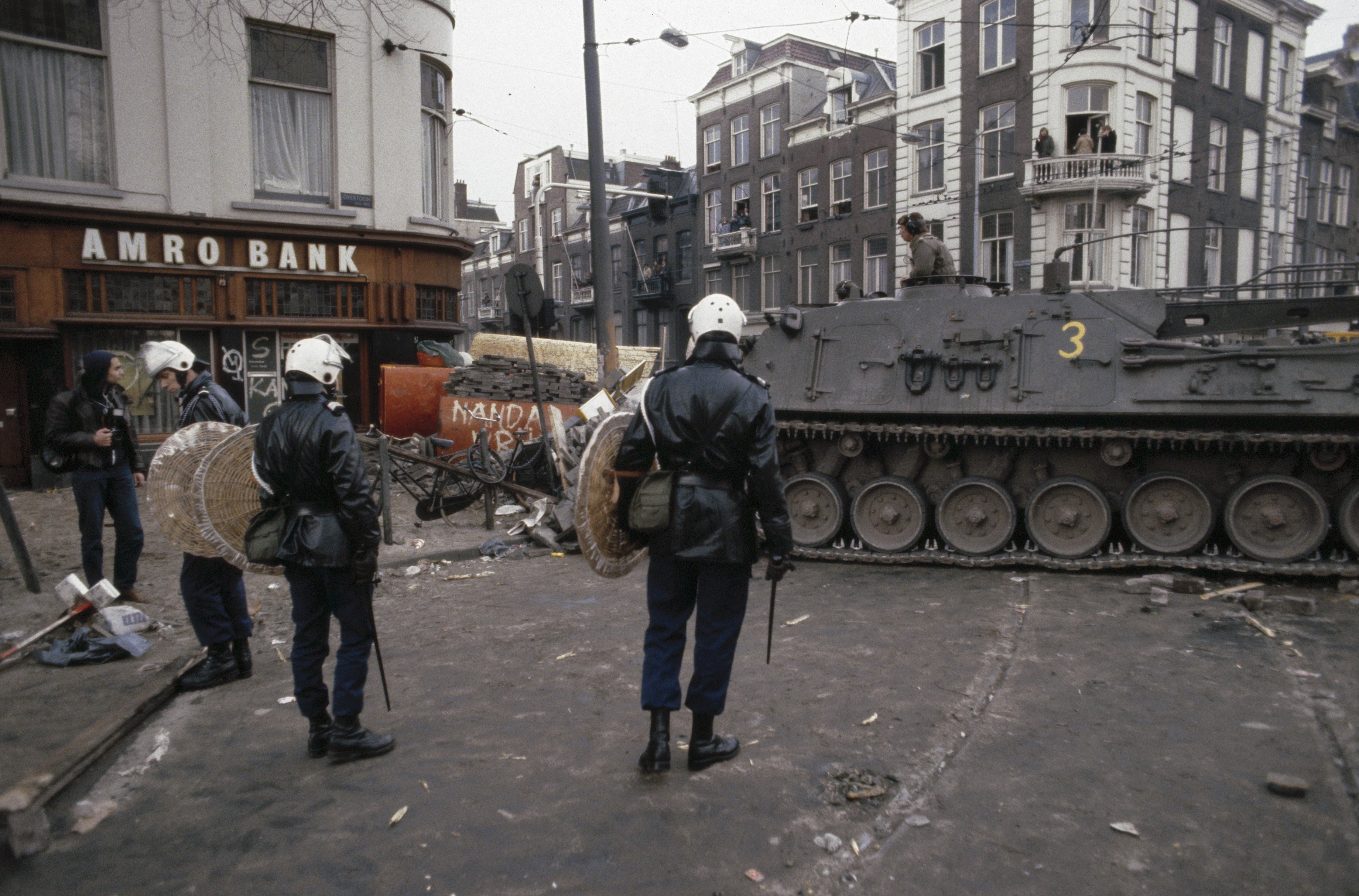 Collectie / Archief : Fotocollectie Anefo Reportage / Serie : [ onbekend ] Beschrijving : Mobiele Eenheid , tanks en pantservoertuigen ruimen barricades rond kraakpand in Vondelbuurt Amsterdam; tank in aktie Datum : februari 1980 Locatie : Amsterdam, Noord-Holland Trefwoorden : Mobiele Eenheid, TANKS, kraakpanden Fotograaf : Croes, Rob C. / Anefo Auteursrechthebbende : Nationaal Archief Materiaalsoort : Dia (kleur) Nummer archiefinventaris : bekijk toegang 2.24.01.06 Bestanddeelnummer : 253-8155